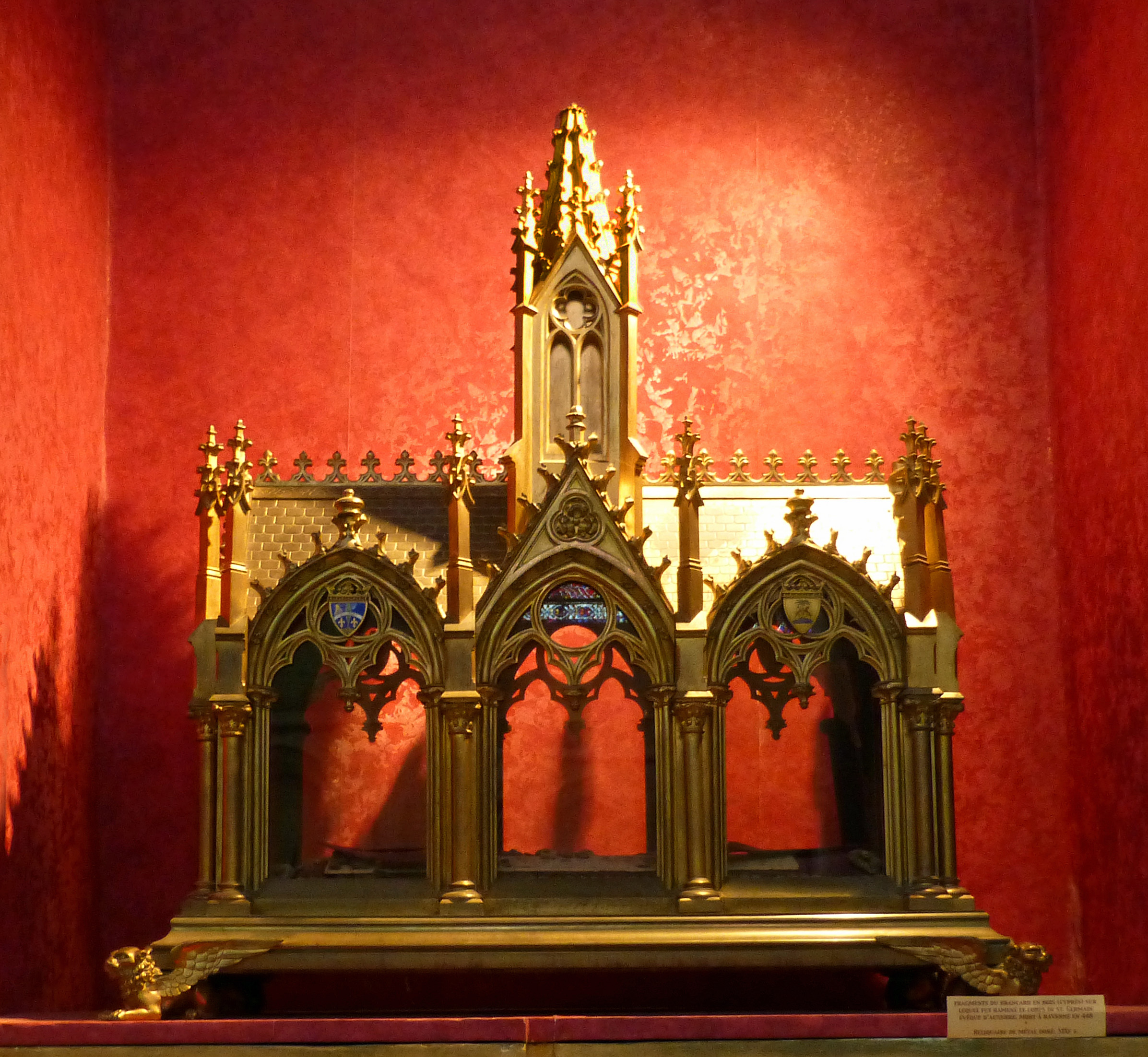 Abbaye Saint-Germain d'Auxerre : châsse contenant des fragments du brancard en bois sur lequel fut ramené le corps de saint Germain depuis Ravenne jusqu'à Auxerre en 448, à la demande de Galla Placidia. Reliquaire en métal doré du XIXe s.